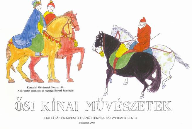 Ősi kínai művészetek kiállítási és kifestő füzet borítóképe